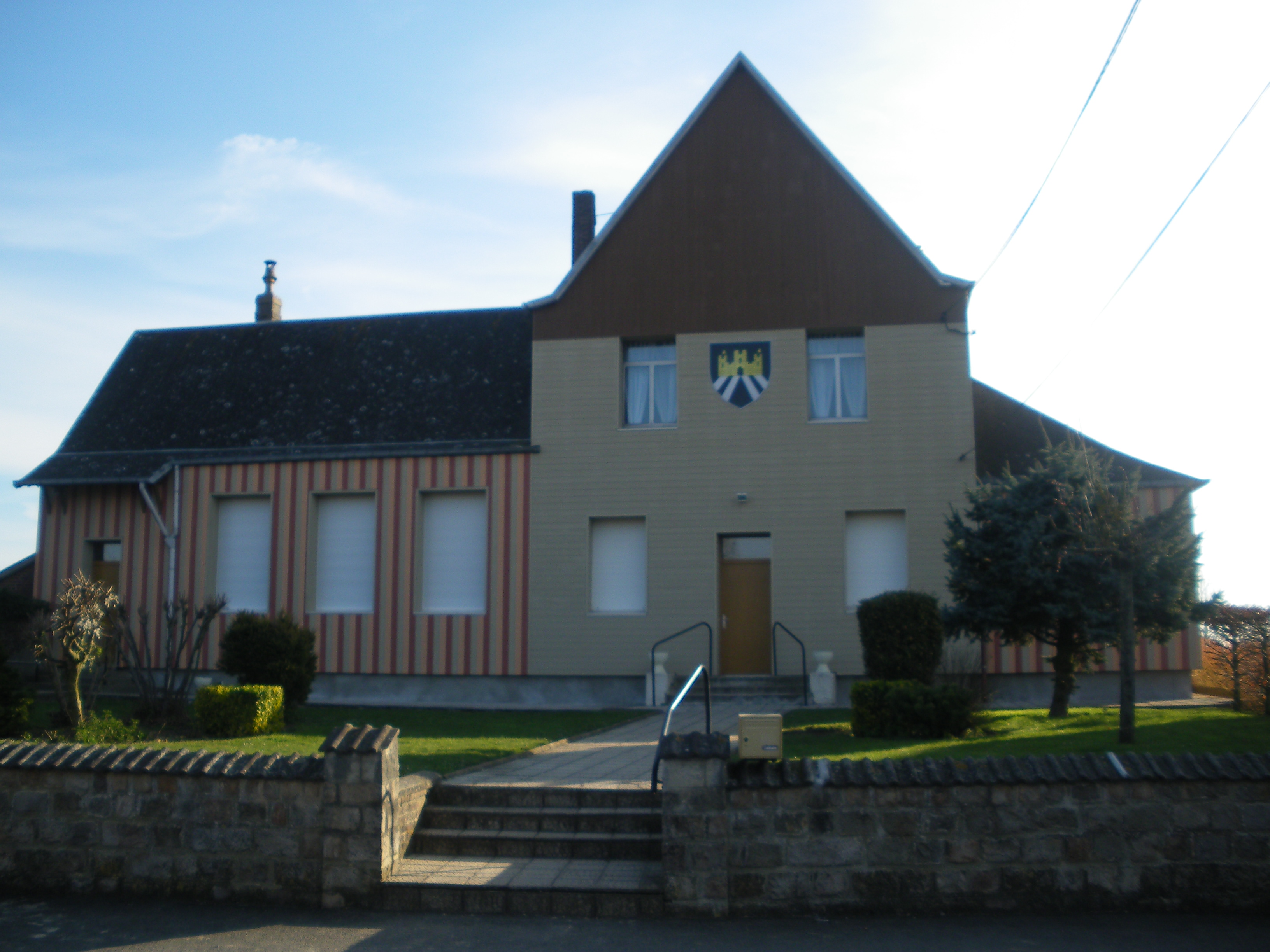 Vue de la mairie de Beaulencourt.